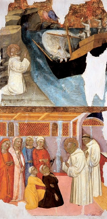 Dues taules d'un retaule dedicat a sant Bernat de Claravall